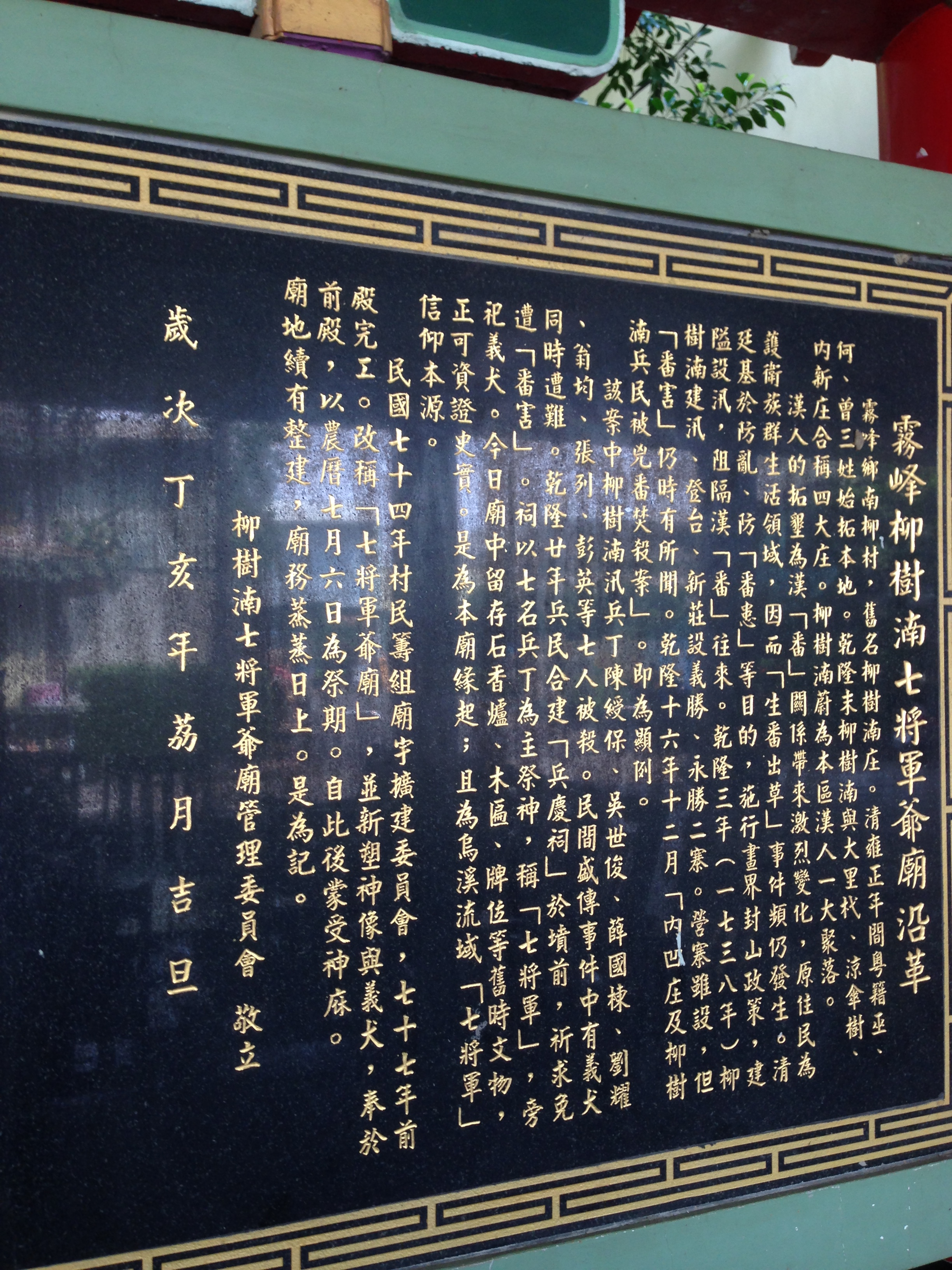 中文（台灣）: 柳樹湳七將軍爺廟沿革